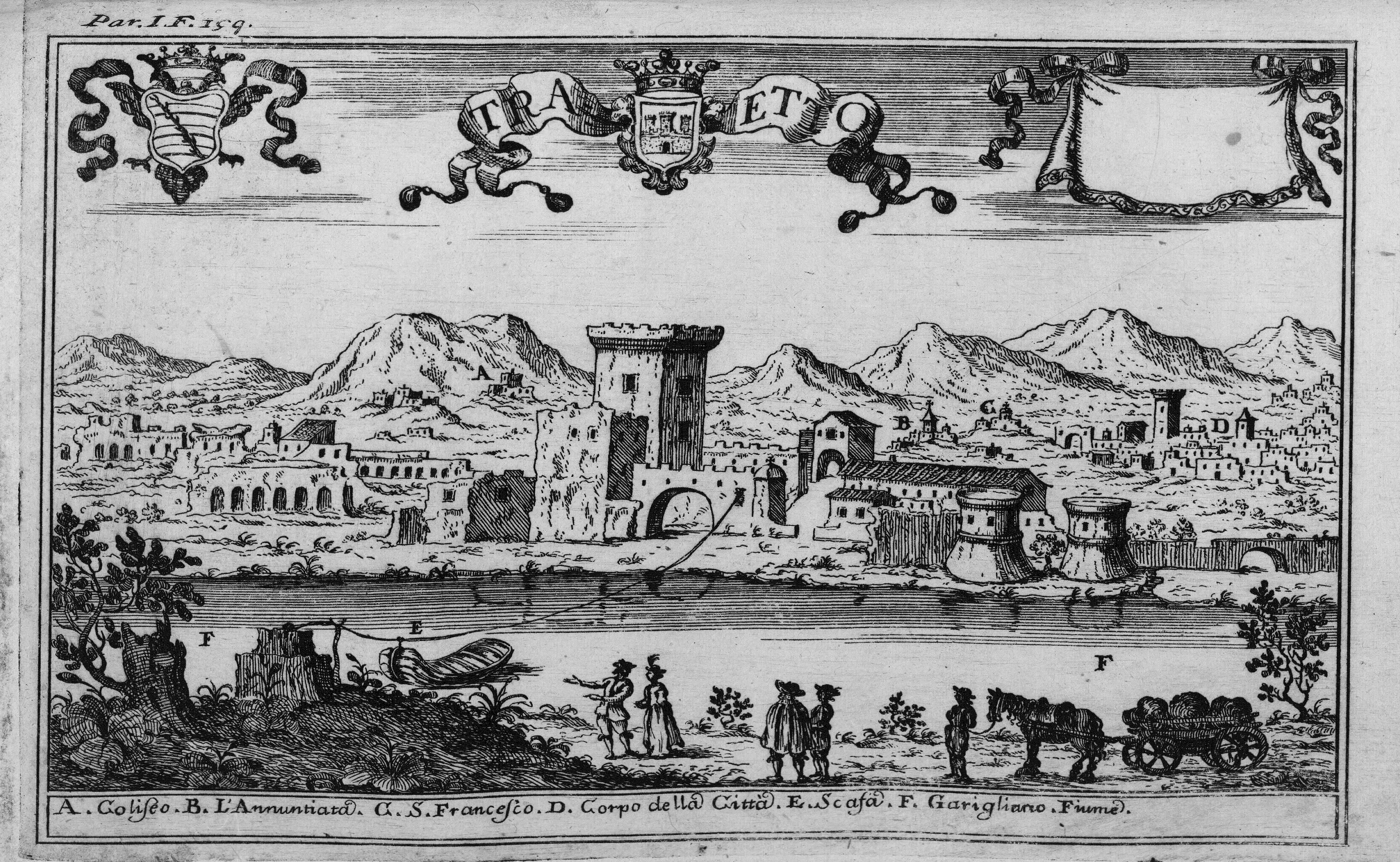 Autor: Pacichelli, Giovanni Battista, 1641-1702 Descripción bibliográfica: Il regno di Napoli in prospettiva : diviso in dodeci provincie, in cui si descrivono la sua Metropoli Fidelissima città di Napoli ... Opera postuma divisa in tre parti / dell'abatte Gio. Battista Pacichelli ; Parte prima [-terza] ... Del regno di Napoli in prospettiva / dell'abate Pacichelli. Parte prima. - In Napoli : nella Stamperia di Michele Luigi Mutio, 1703. - v. : principalmente il.; 4º . - Inic. adorn. y frisos dec. - Grab. calc. y h. pleg. grab. calc. de mapas de Cassianus de Silva. Ilustrador: Cassiano De Silva, Francesco, il. Impresor: Muzio, Michele Luigi, imp. Lugar de impresión: Italia. Nápoles Localización: Vea la ilustración en su contexto